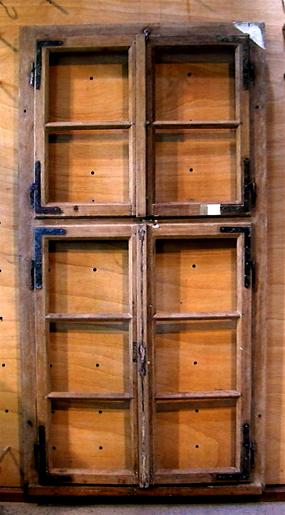 Fenster nach Entfernung der Lackschichten und dem Ausbau des Glases.